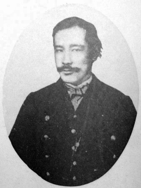 a Japanese man 荒井郁之助 (Ikunosuke Arai)